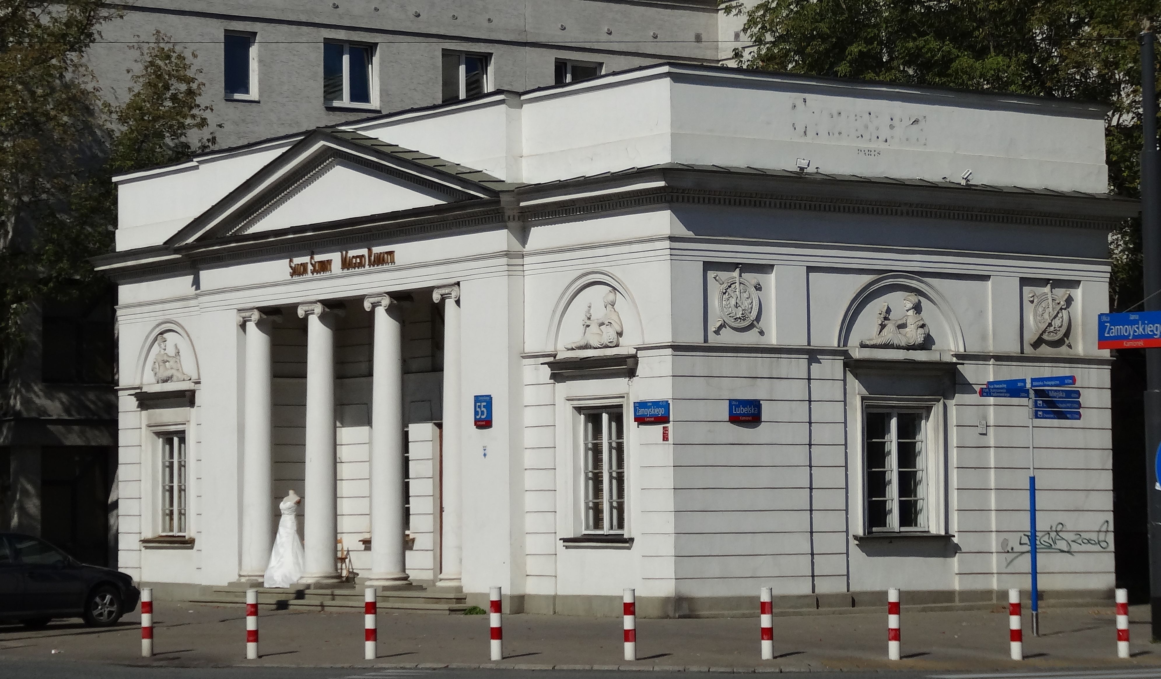 Rogatka grochowska II (północna) ul. Zamoyskiego 55, Warszawa, dz. Praga Południe